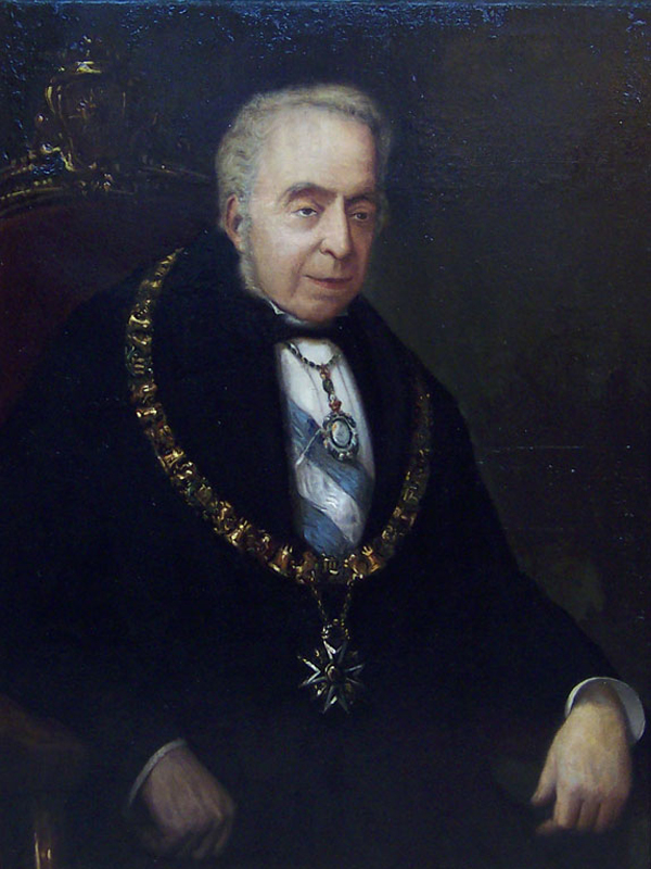 José Solano de la Matalinares (1802-1882).